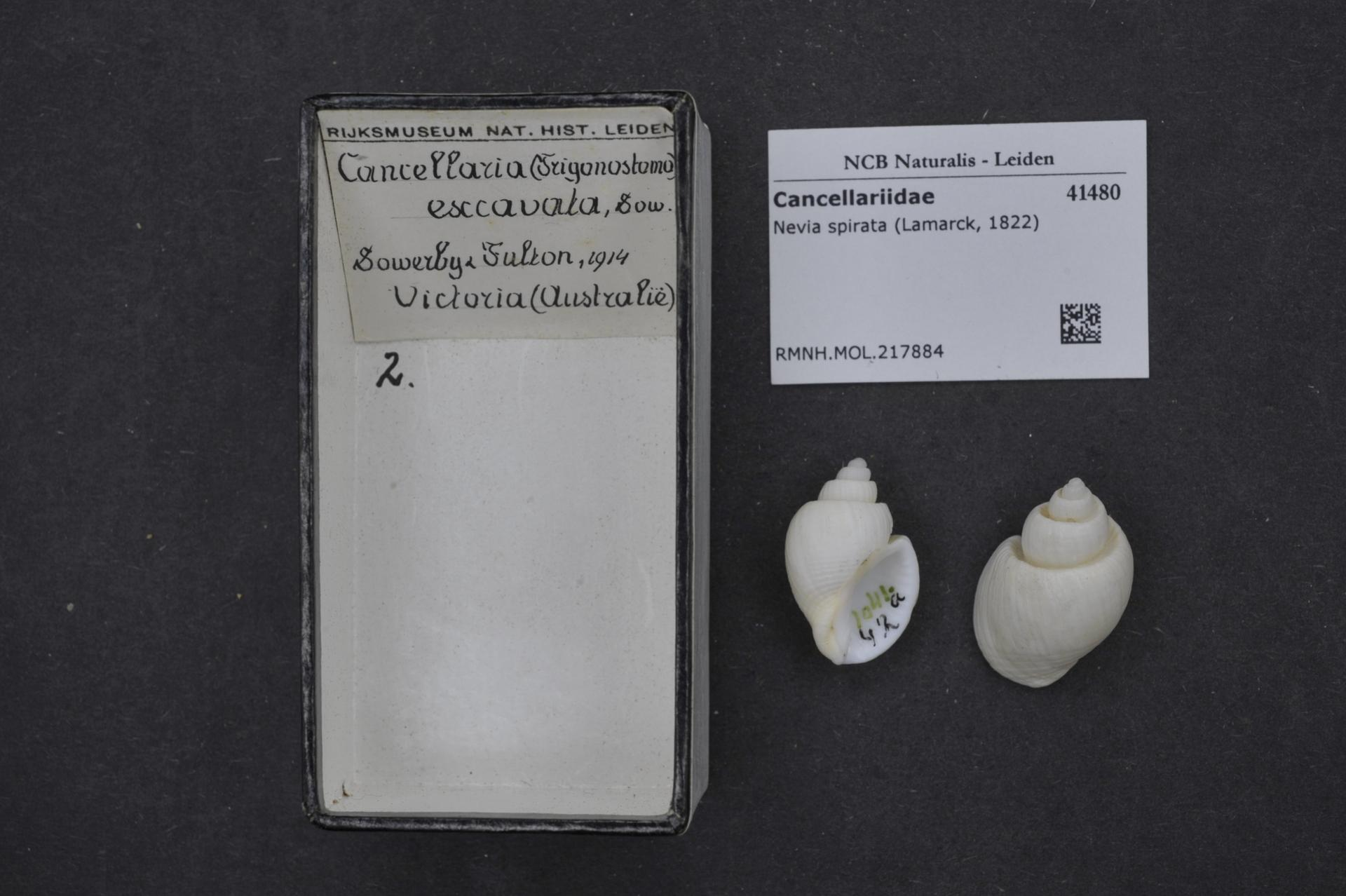 Nevia spirata (Lamarck, 1822)